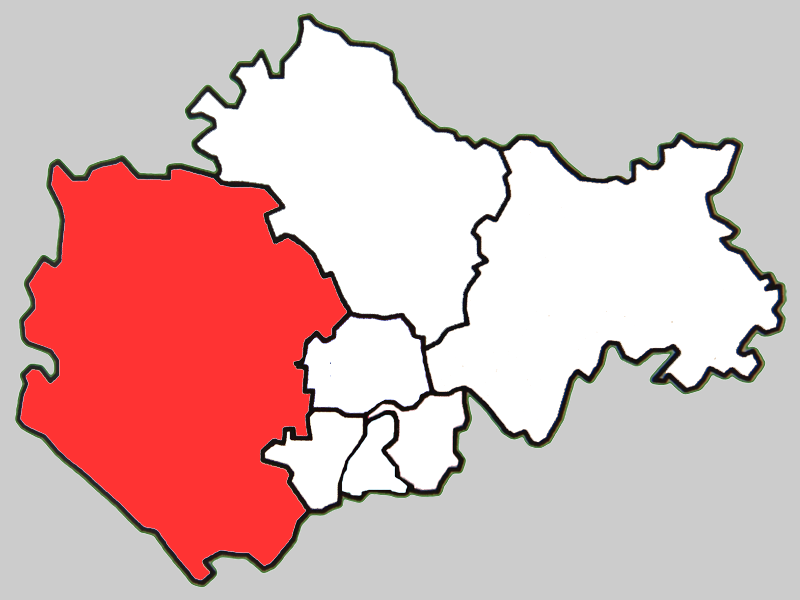 蚌埠市怀远县地图